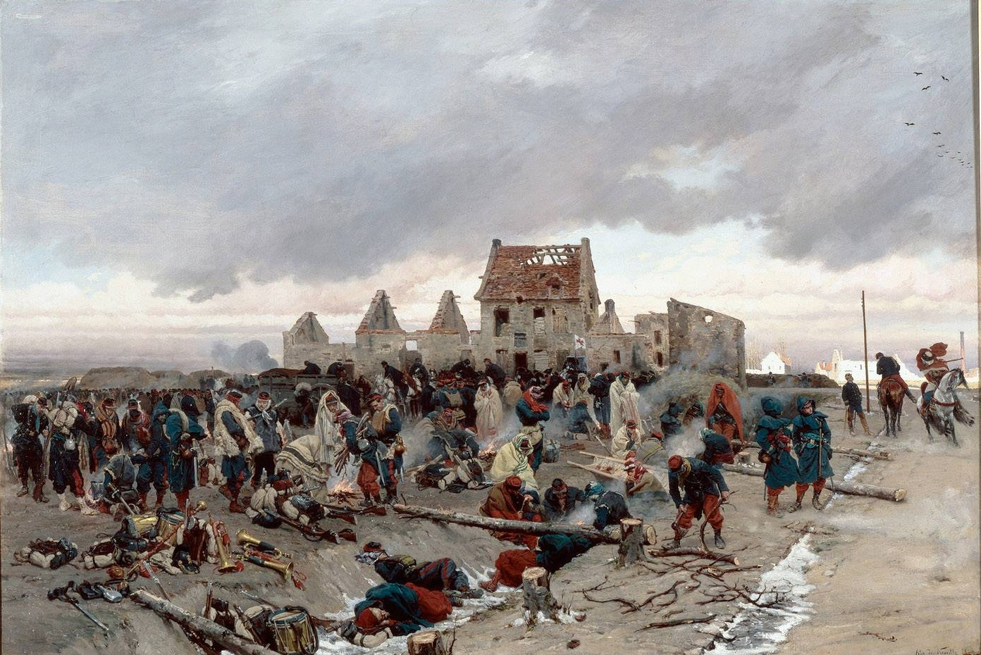 Bivouac après le combat du Bourget, 21 décembre 1870. (date representée: 30 décembre 1870)